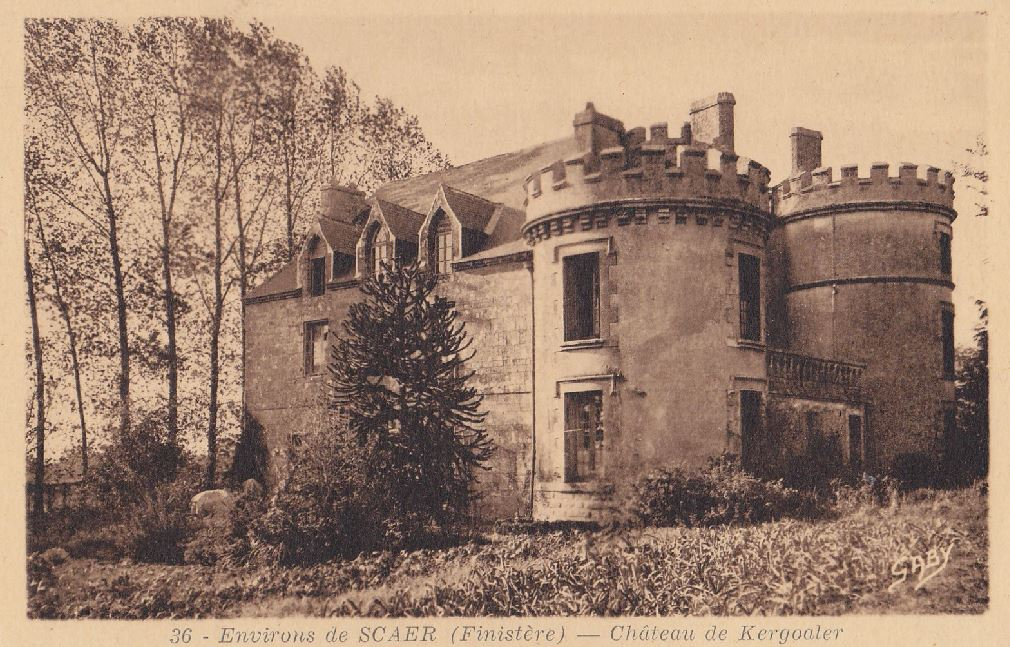 carte postale ancienne du premier quart du vingtième siècle du château de Kergoaler en Scaër